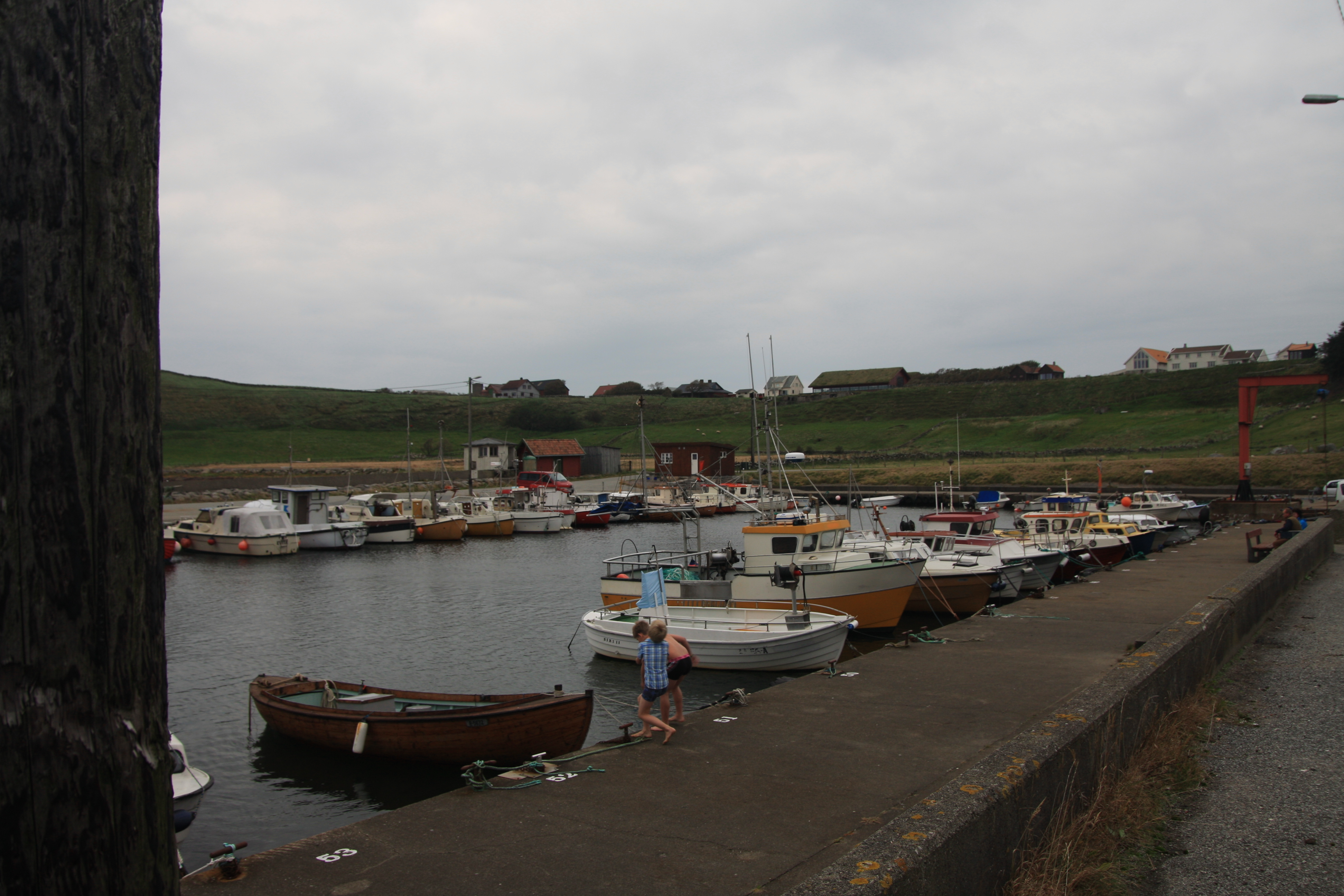 Obrestad havn - Havneområdet